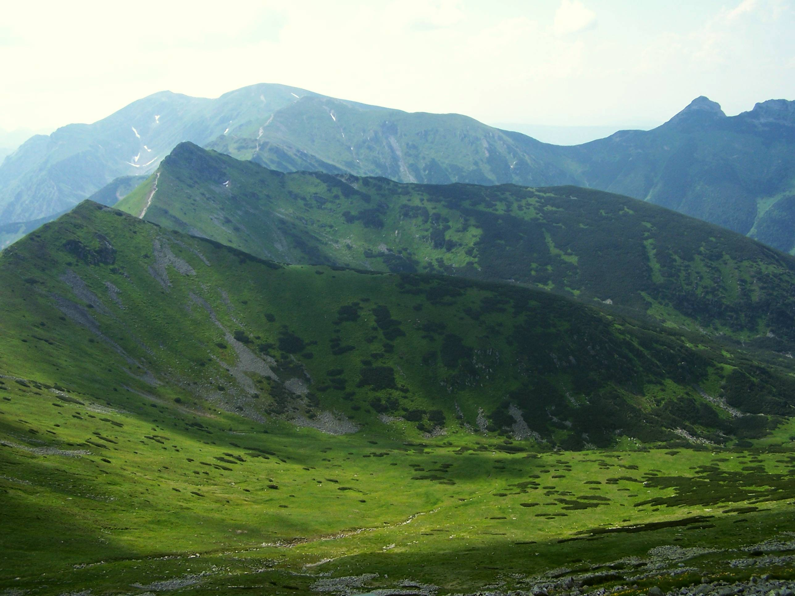 Goryczkowa pod Zakosy (Tatra Mountains)